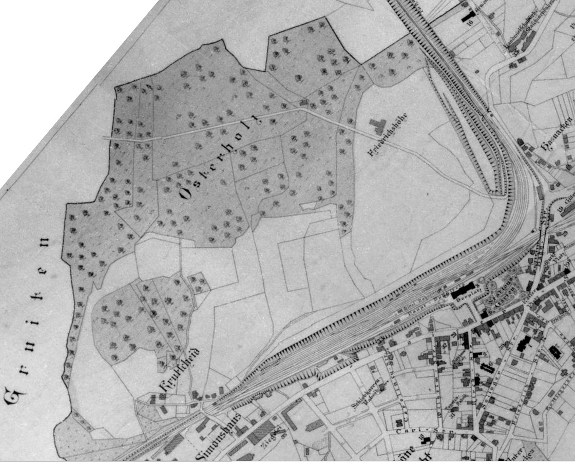 Ausschnitt Osterholz (Wuppertal), Karte Vohwinkel von 1895 (Landmesser Parnemann) - genordet